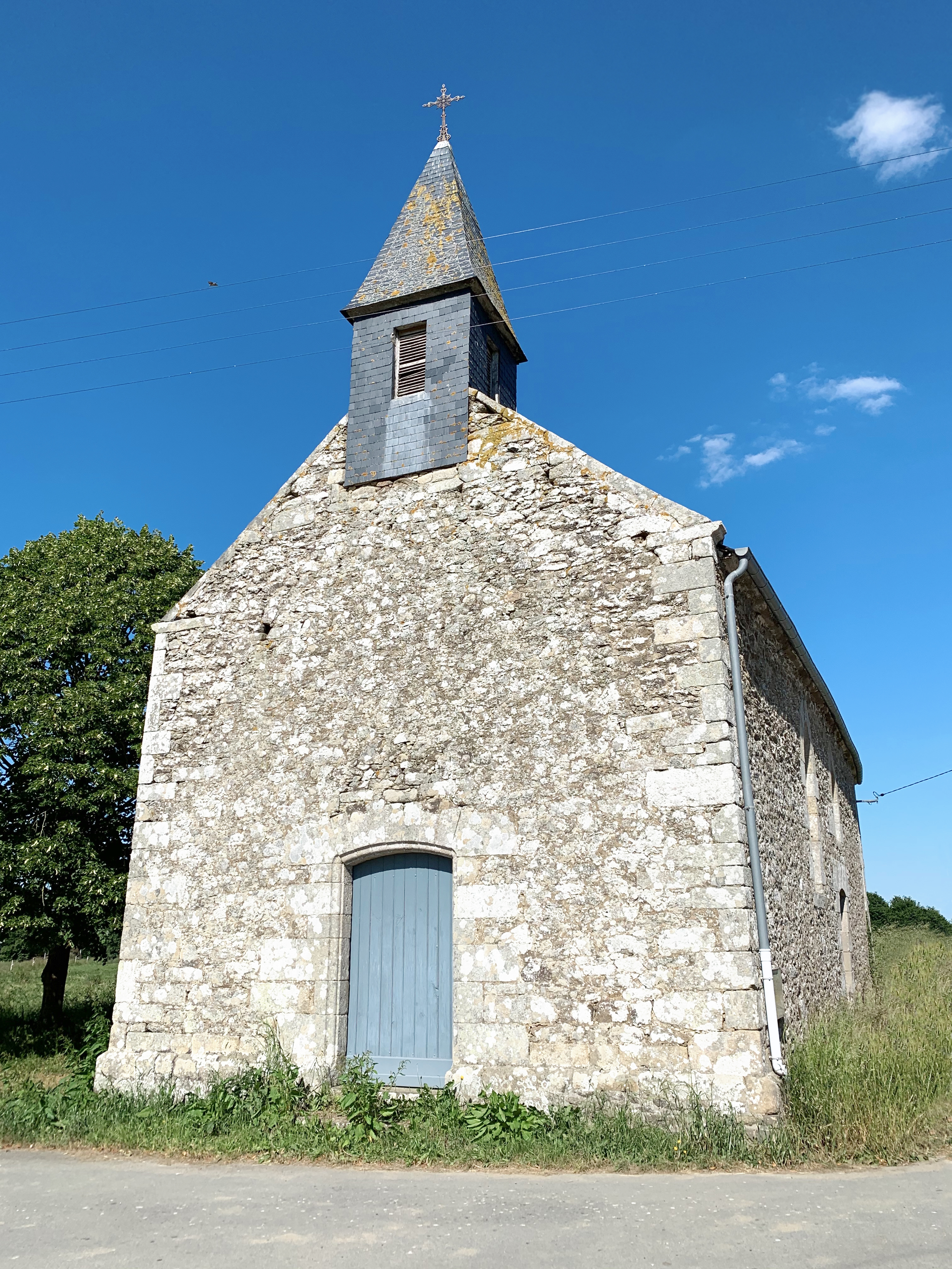 La Chapelle Sainte-Eugénie à Corseul dans les Côtes d’Armor en Bretagne.